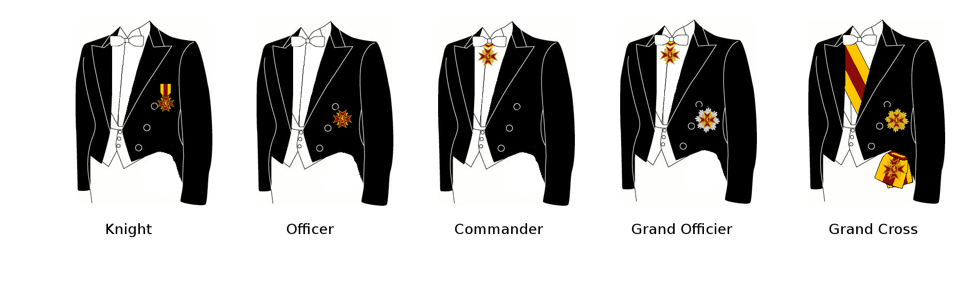 Tragweise - Royal Order of the Lion (Godenu)